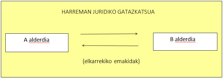 Transakzio kontratuak - Alderdien arteko akordioa